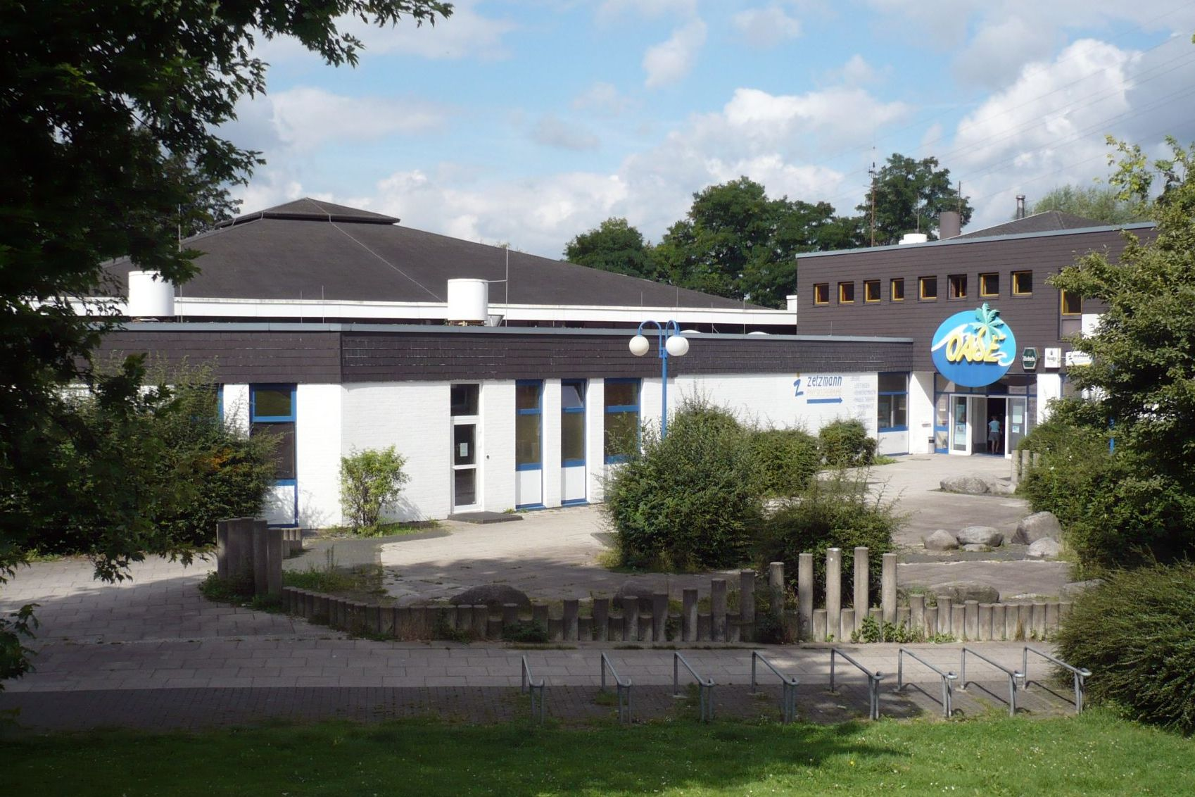 Das Freizeitbad Oase in Essen-Frohnhausen, 2010 geschlossen, 2013 Abriss